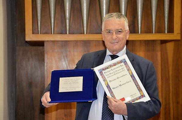 Premiazione di Mauro Montacchiesi a Firenze